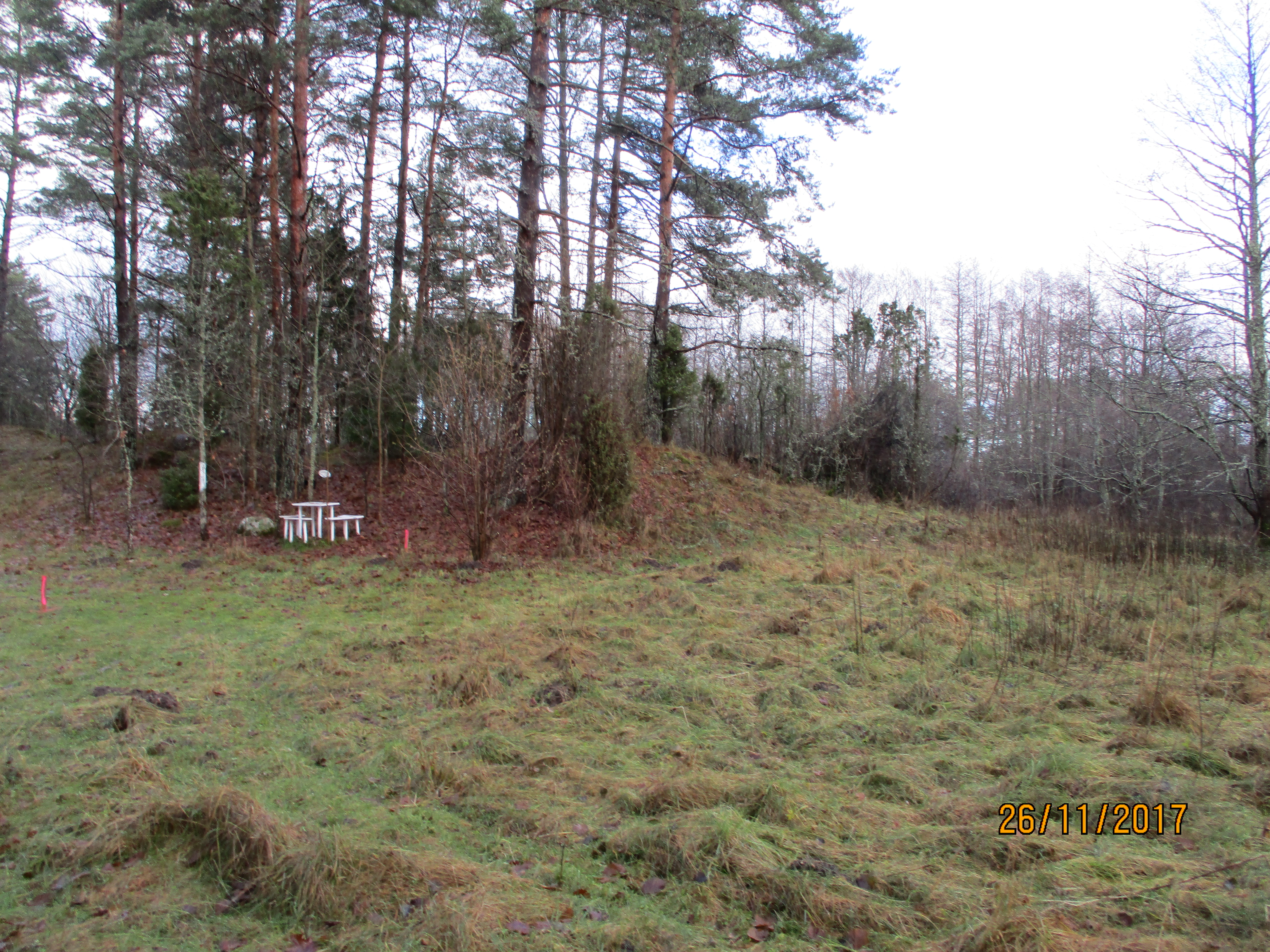 Linnusekünka edelanurk lääne poolt.